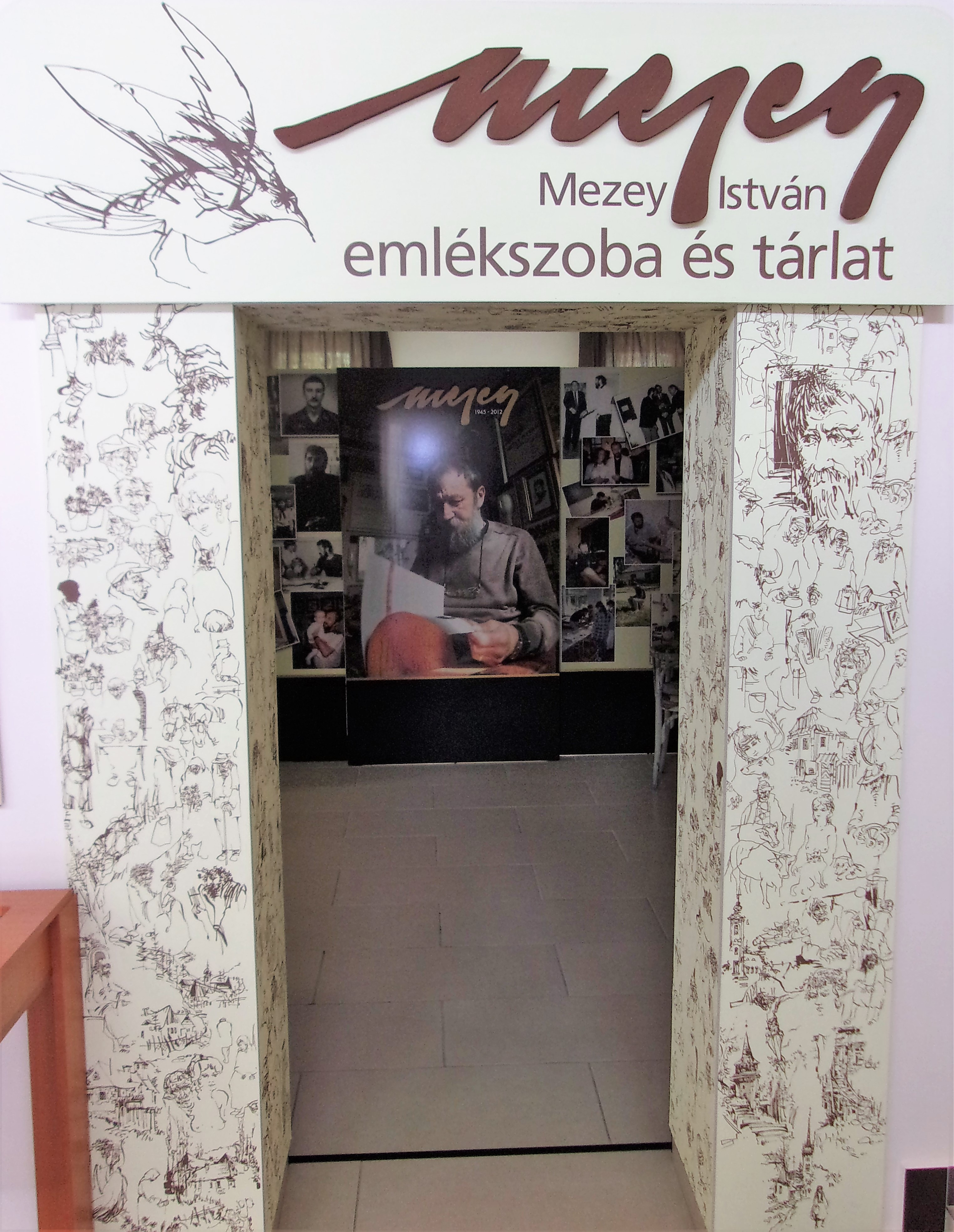 Mezey István Emlékszoba és Tárlat a Mezey István Művészeti Központban - Kazincbarcika